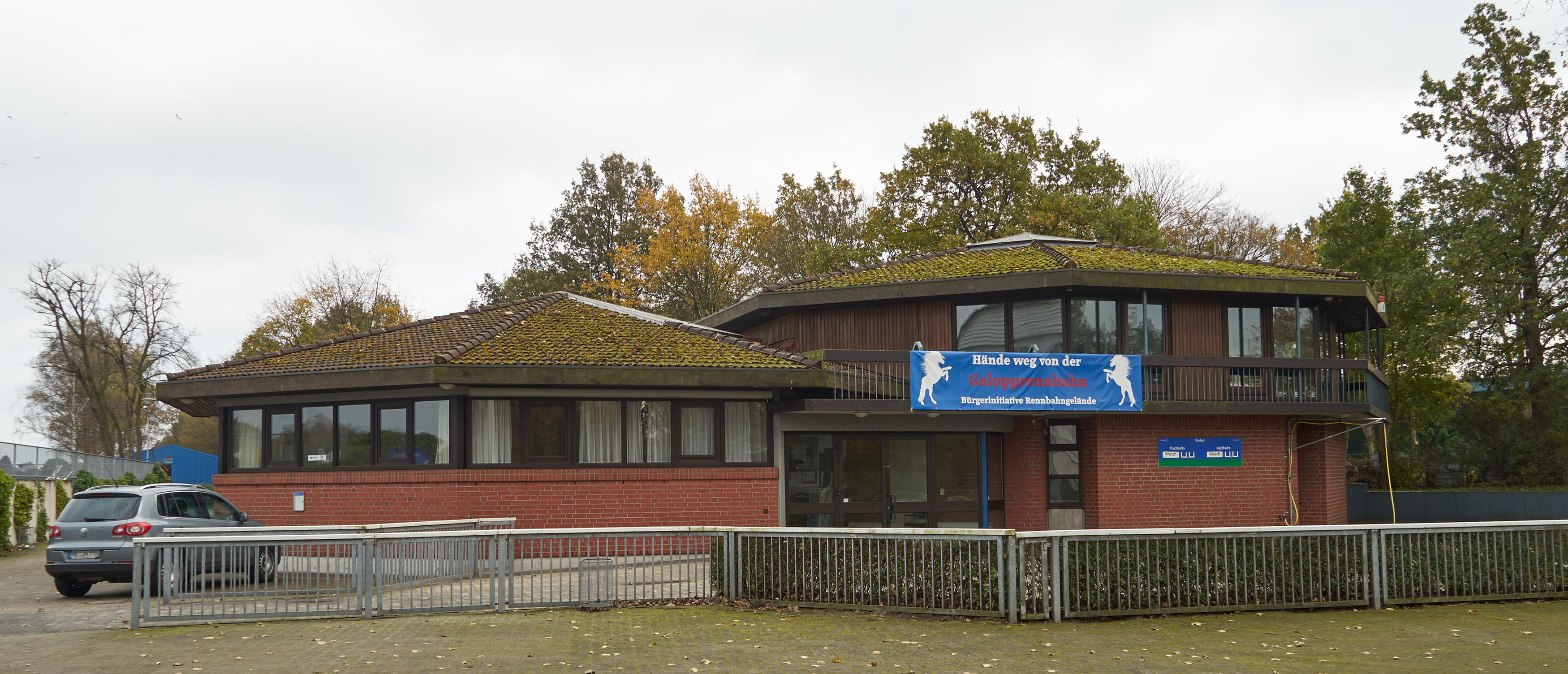 Galopprennbahn Bremen. Waagegebäude und Geschäftsstelle des Bremer Rennvereins